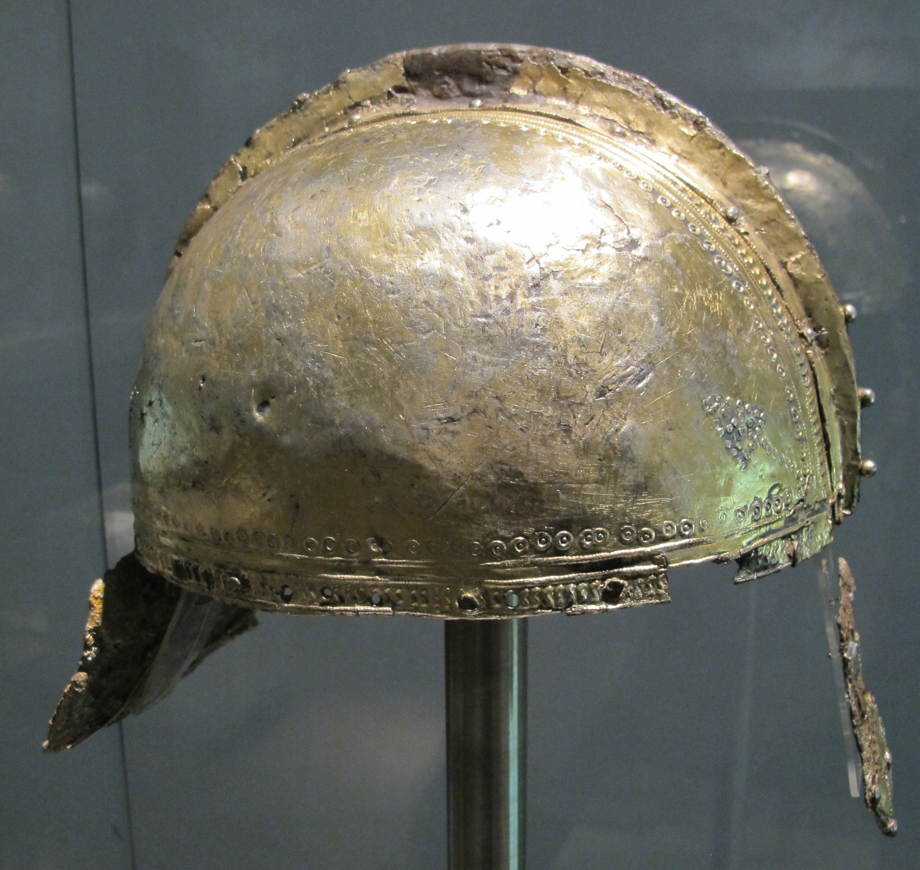 Elmo da ufficiale in acciaio, coperto di foglia d'argento, IV sec, da augusta-pfersee